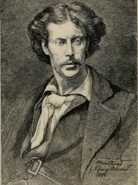 Portrait de Georges Montbard par Godefroy Durand (1886).